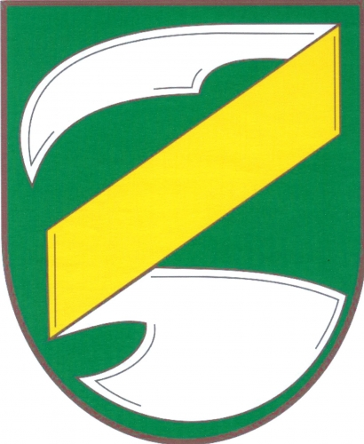 znak, Zvěrkovice, okres Třebíč